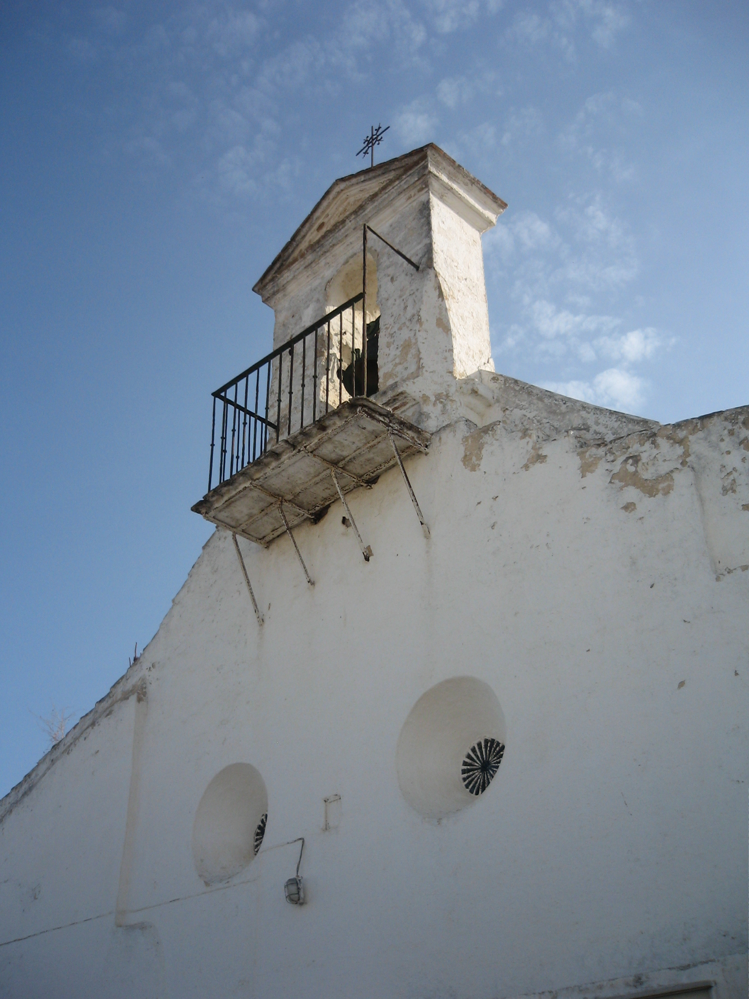 Cementerio de San Antonio Abad de Sanlúcar de Barrameda